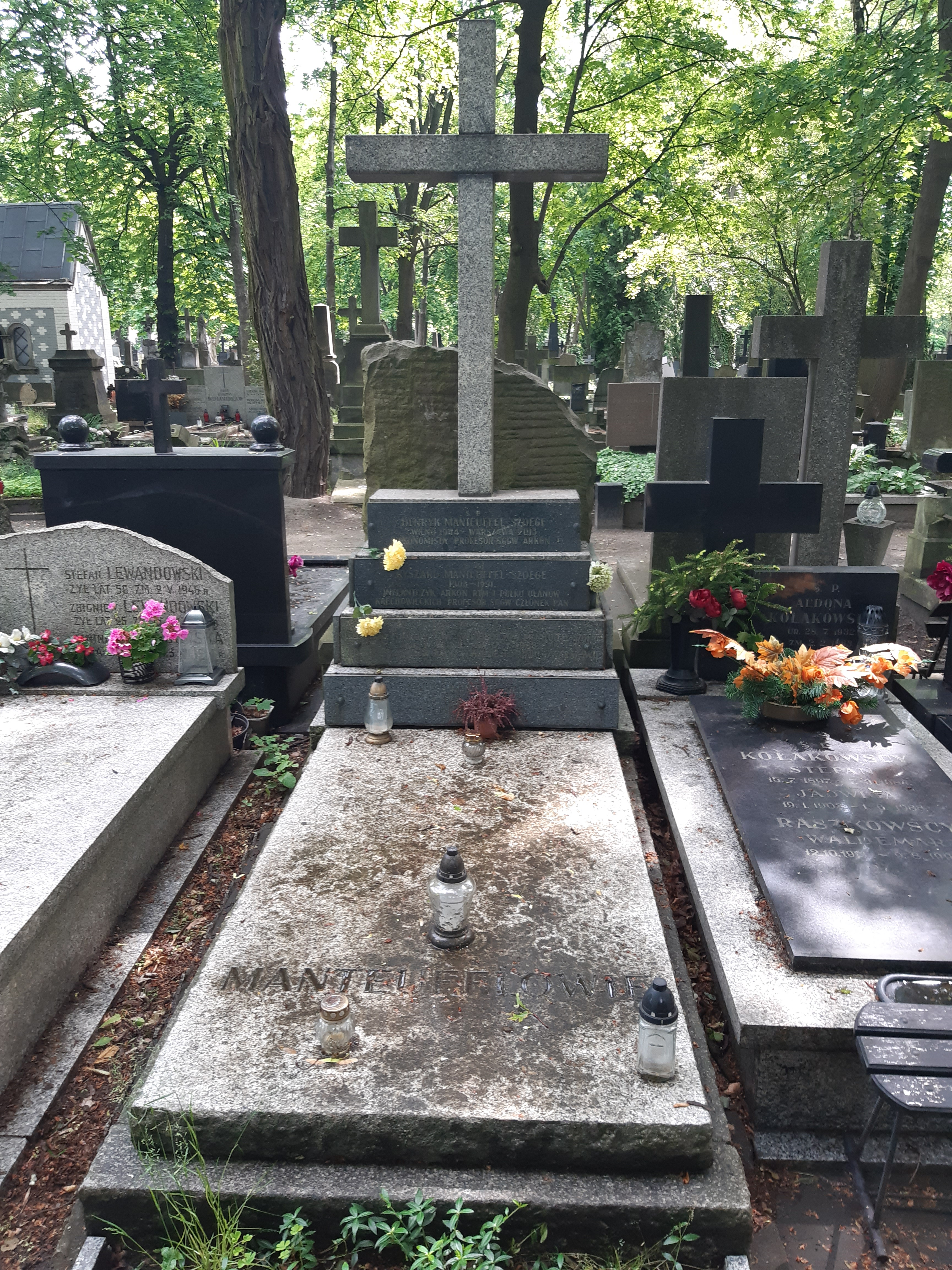 Grób Edwarda Manteuffel-Szoege na Cmentarzu Powązkowskim